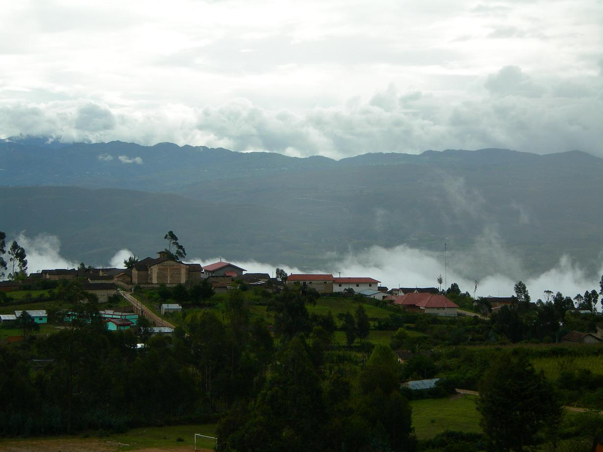 Pueblo de Huancas cerca de Chachapoyas (Peru)